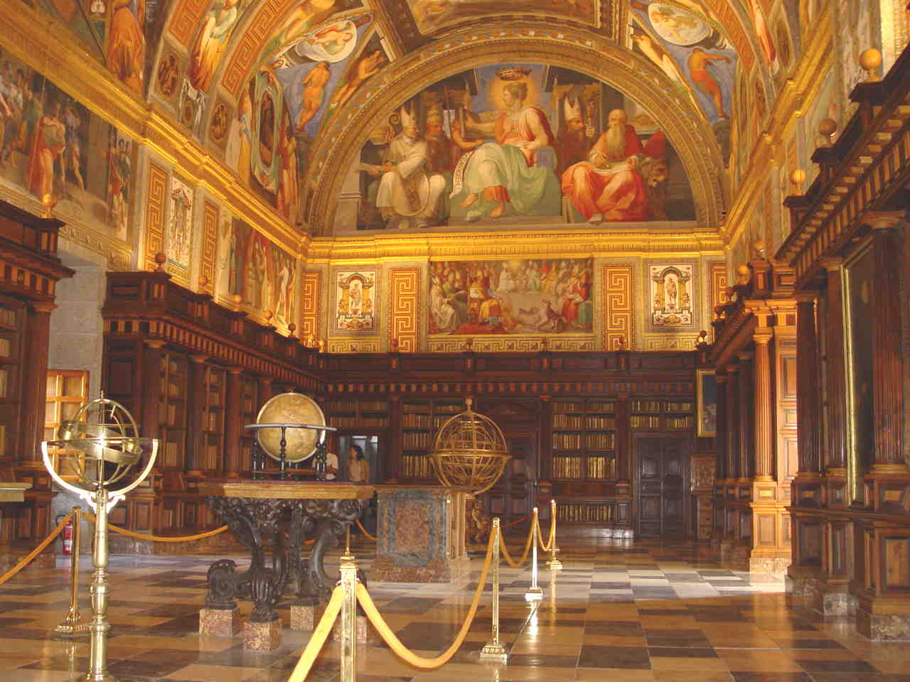 La Biblioteca del Monasterio de San Lorenzo de El Escorial fue en su tiempo una de las más importantes del mundo y actualmente continua siendo una fuente fundamental para muchos investigadores, no solo de nuestra historia, tambien en las ciencias, por la importancia de su fondo de alquimia